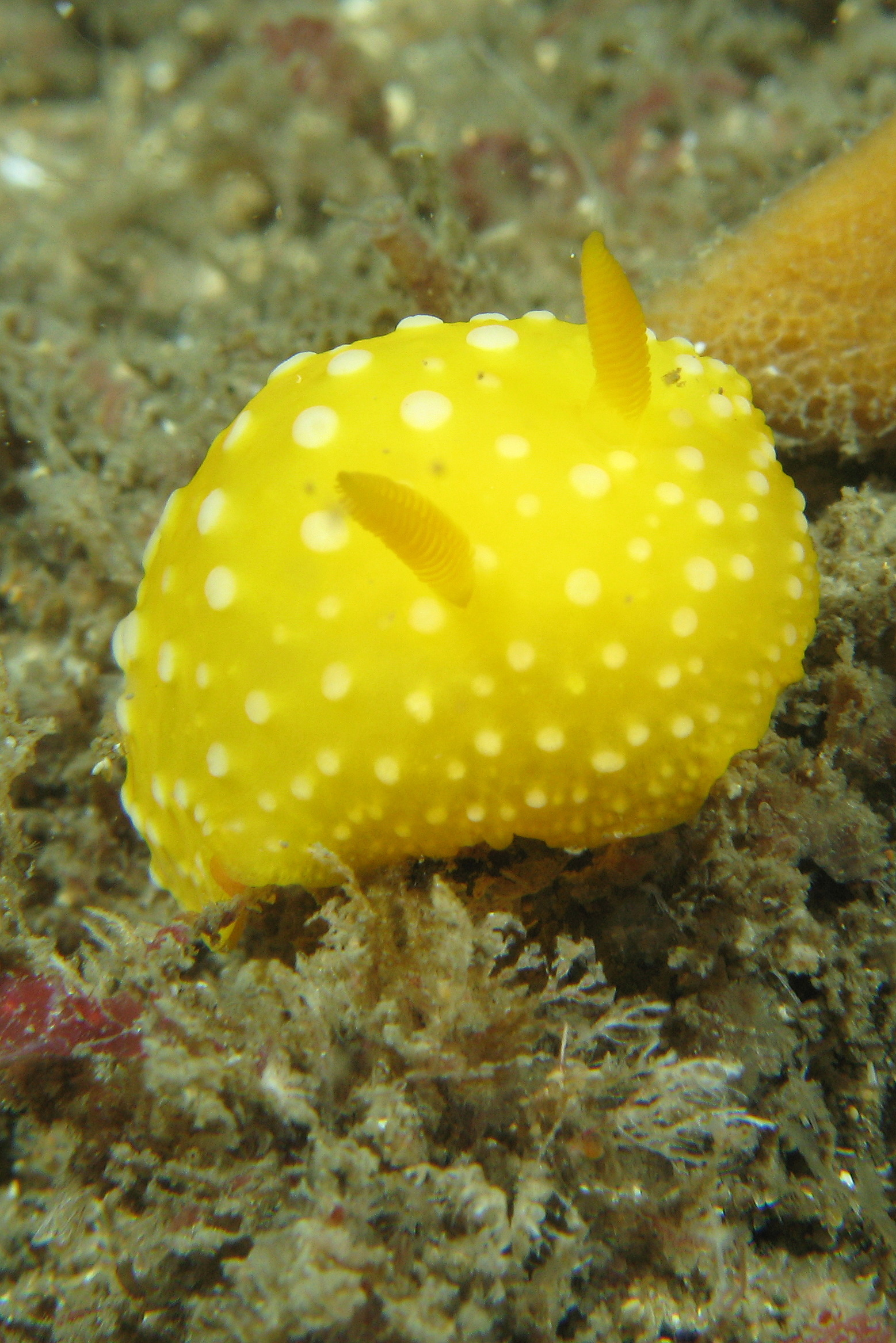 Doris chrysoderma, Sydney, Australia